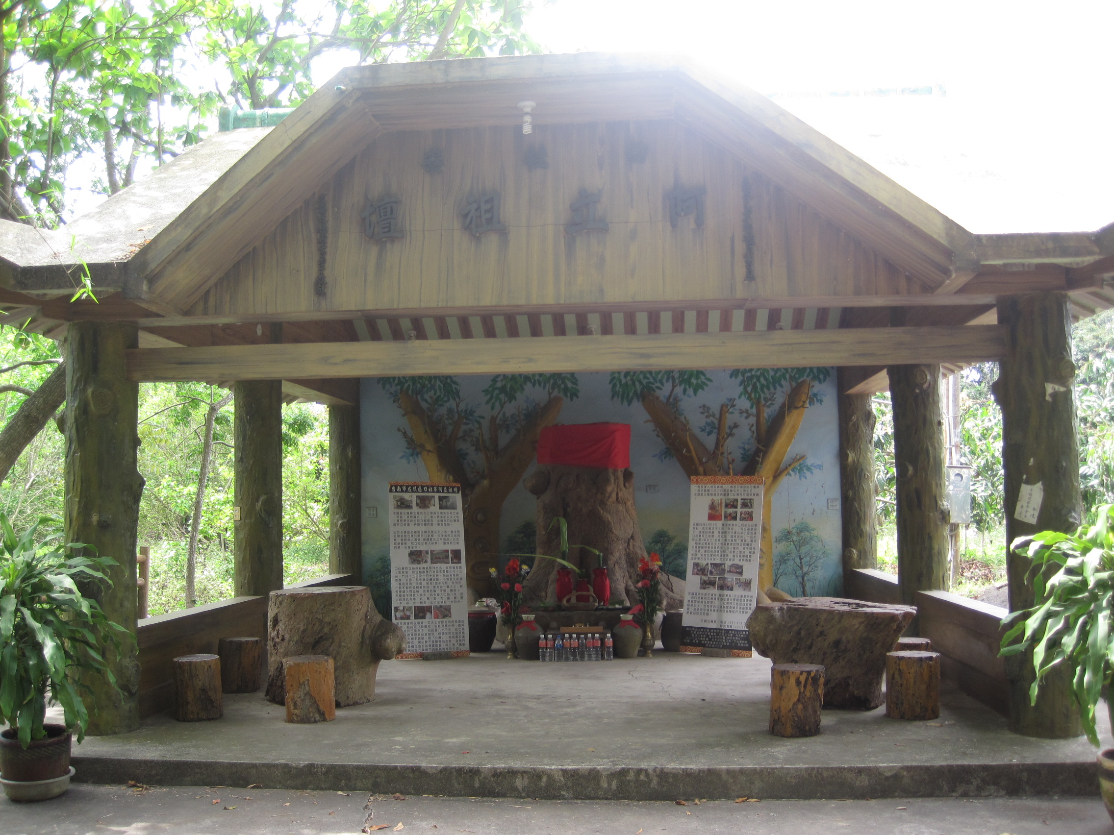 位於臺灣臺南市左鎮區的口社寮阿立祖壇